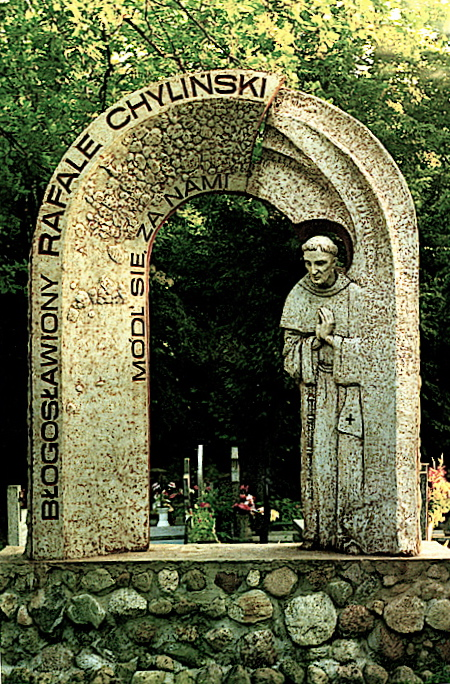 Rzeźba bł. Rafala Chylińskiego-Kwatera Cmentarna Franciszkanów (Cmentarz Lagiewnicki Łódz 1997